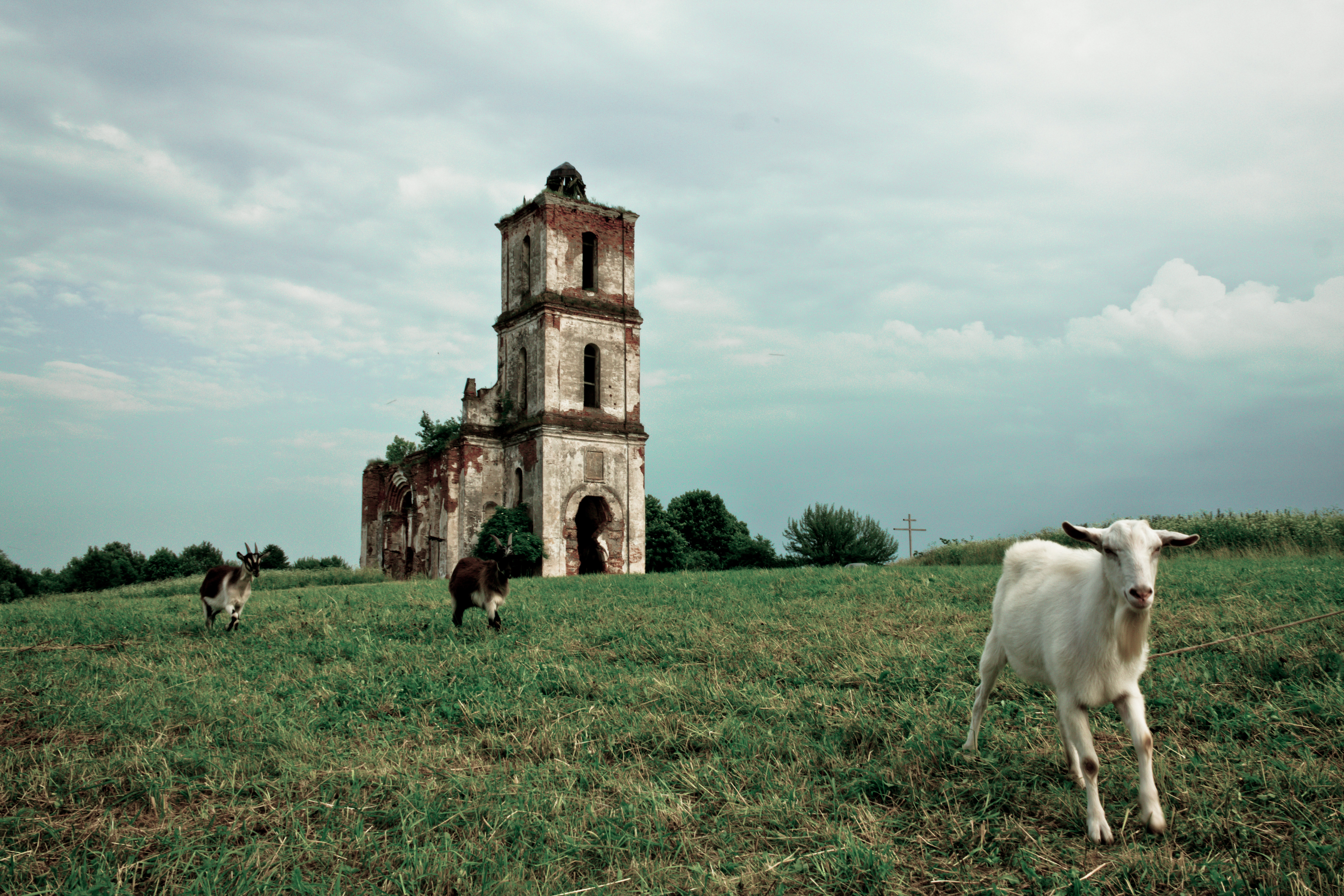 Беларуская (тарашкевіца): Рэшткі Троіцкай царквы. в. Белая Царква